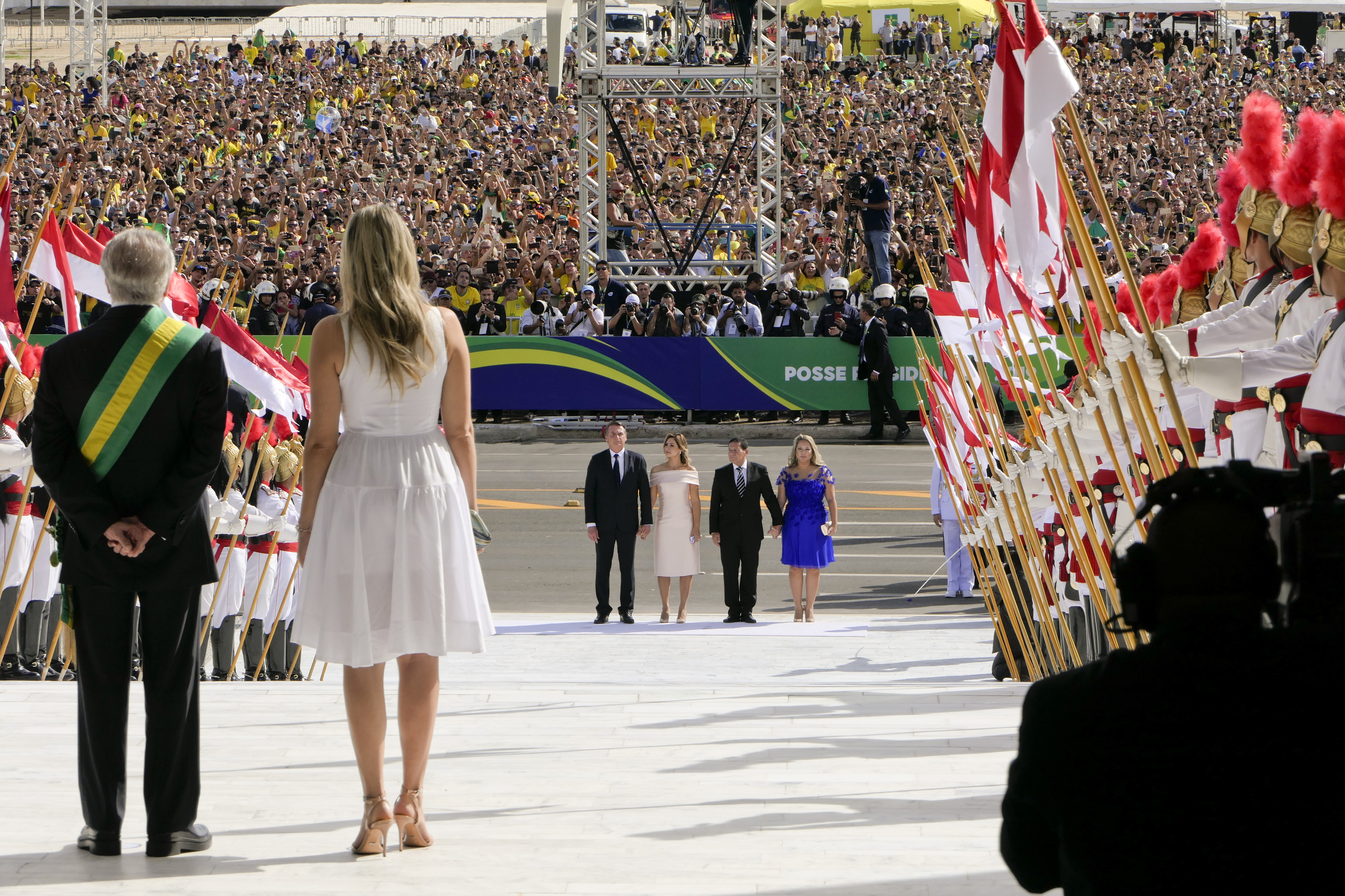 Solenidade de posse do presidente da República e do vice-presidente eleitos. Michel Temer e sua esposa, Marcela Temer aguardam o presidente da República para transmitir a faixa presidencial. Foto: Roque de Sá/Agência Senado